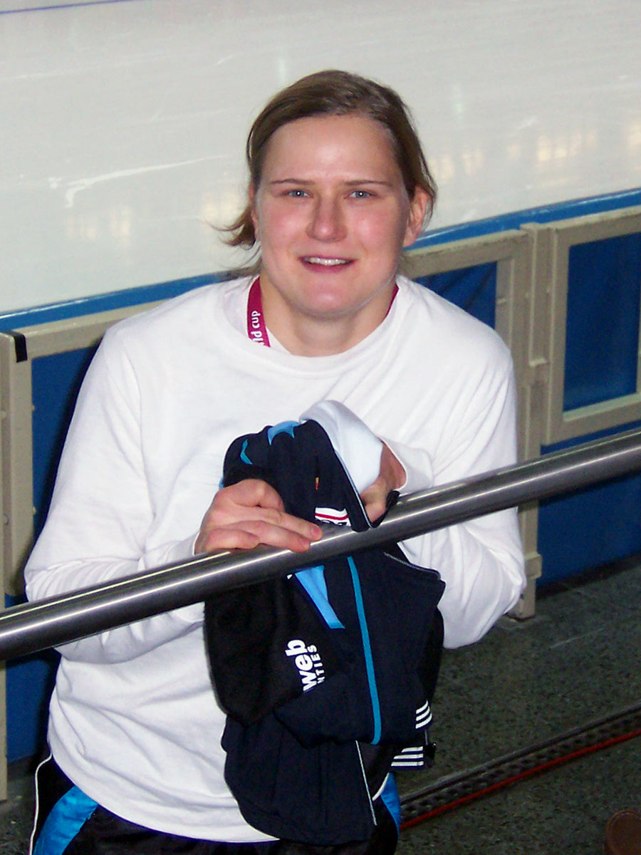 Eisschnelllauf-Weltcup 2006 in Berlin